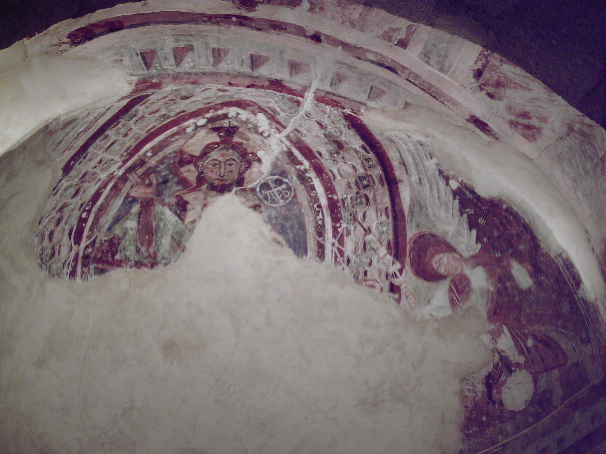 fresque dans le choeur